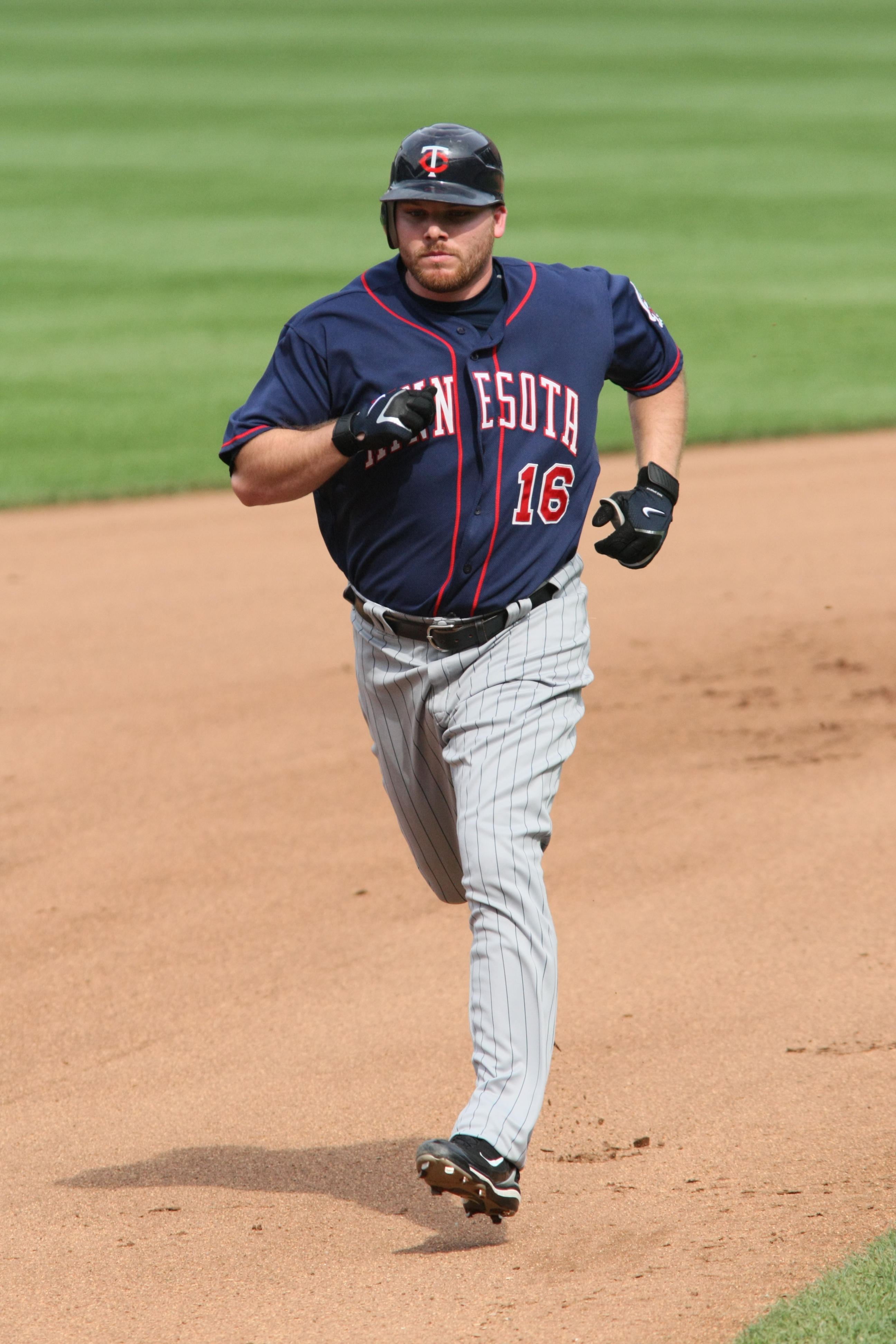 Jason Kubel